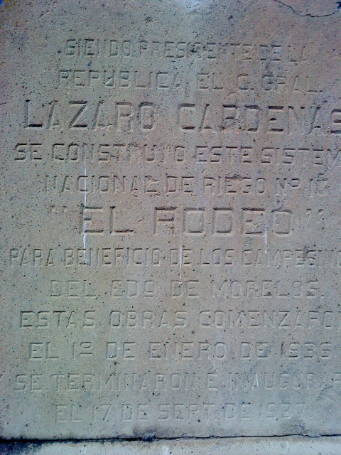 es una fotografia de la placa conmemorativa de la presa del rodeo